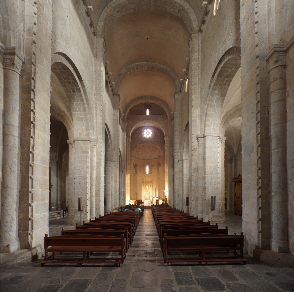 unidentified Spain